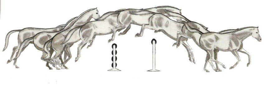 Fase del salt